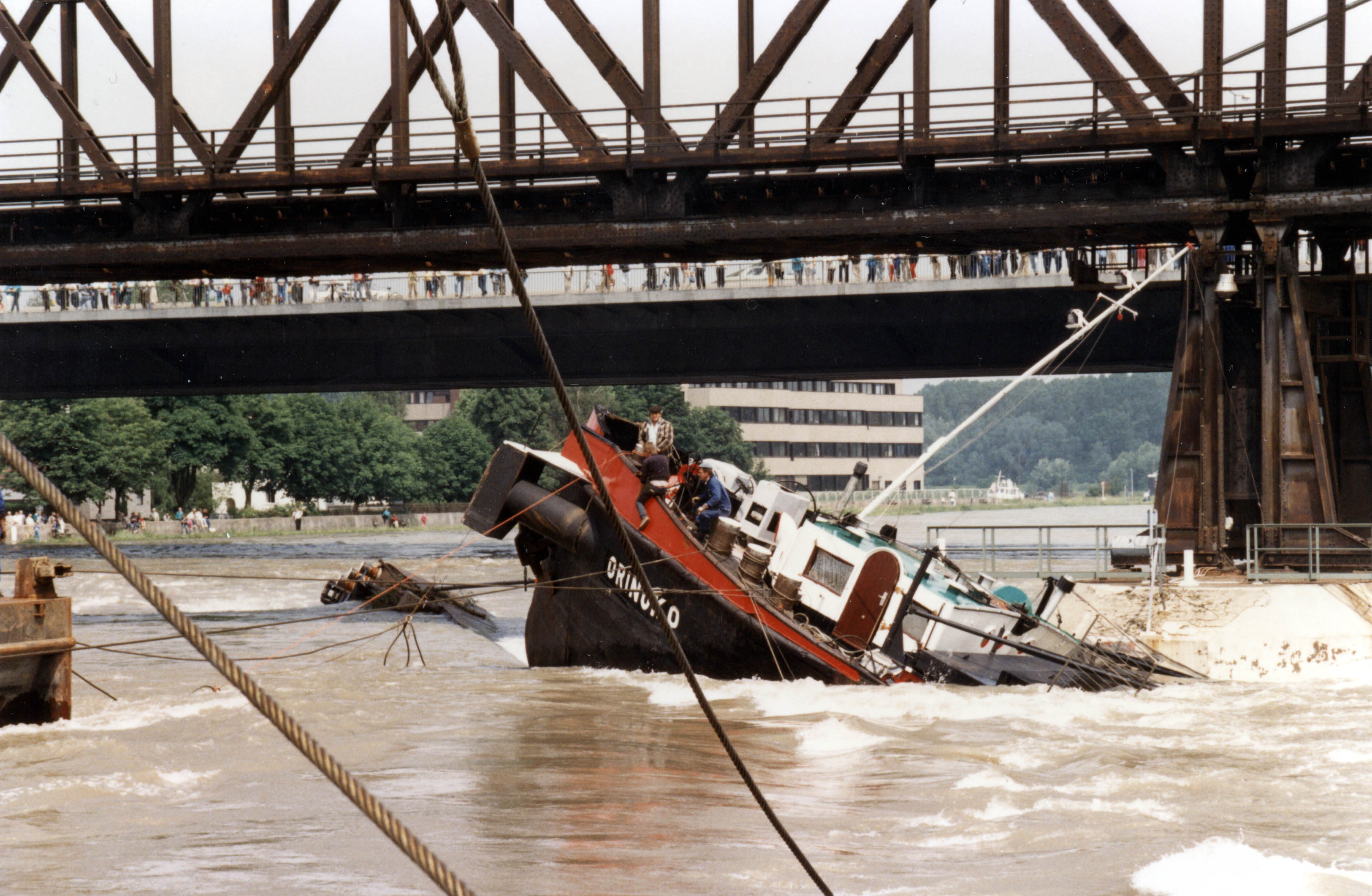 Wrackbergung vor der Brücke Karlsruhe-Maxau, MS "Orinoko" und SL "Pavo" vor dem Brückenpfeiler liegend, Trossenbefestigung